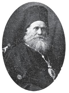 Козма Дебърски.